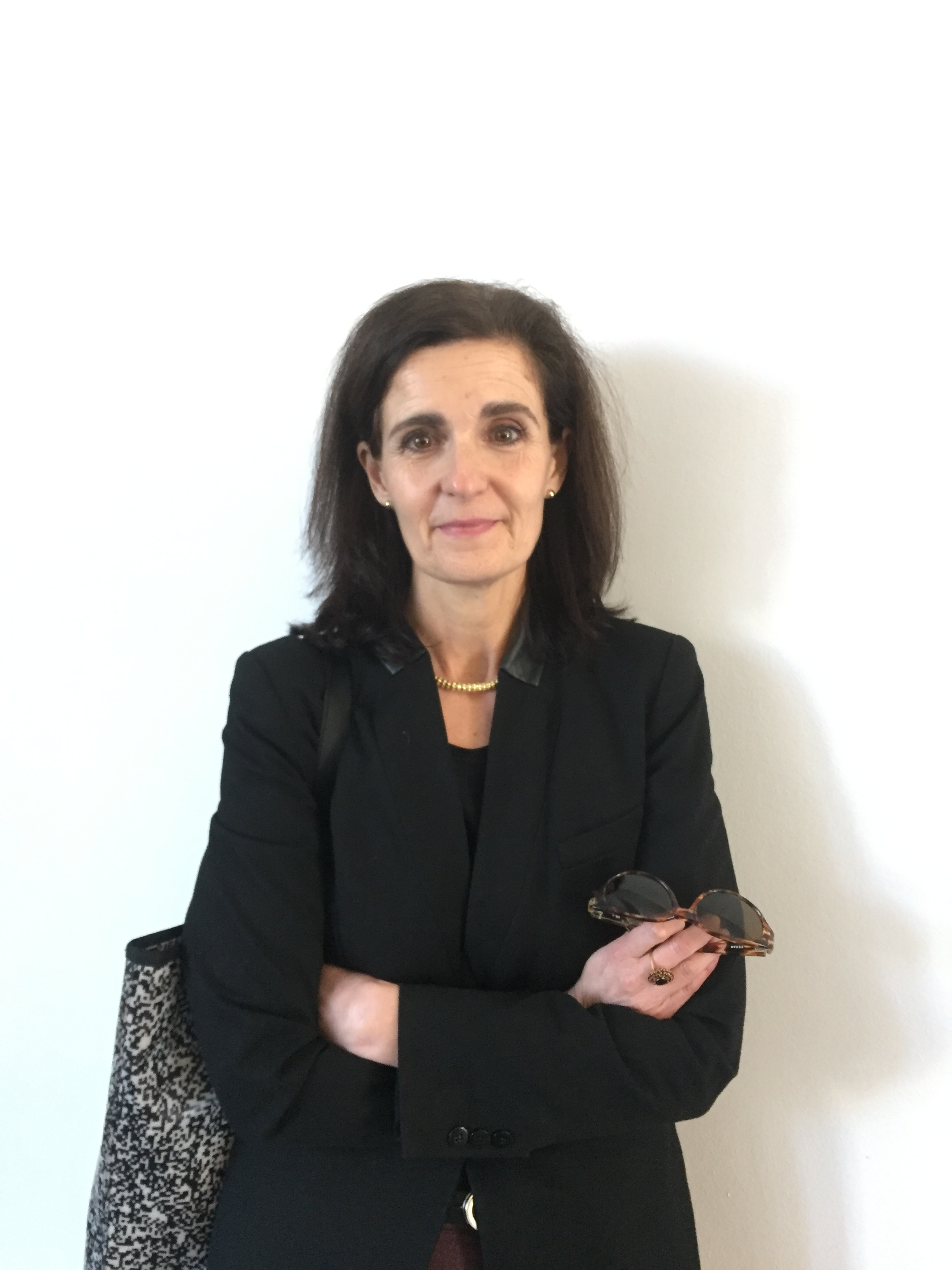 En en Museo Lázaro Galdiano de Madrid